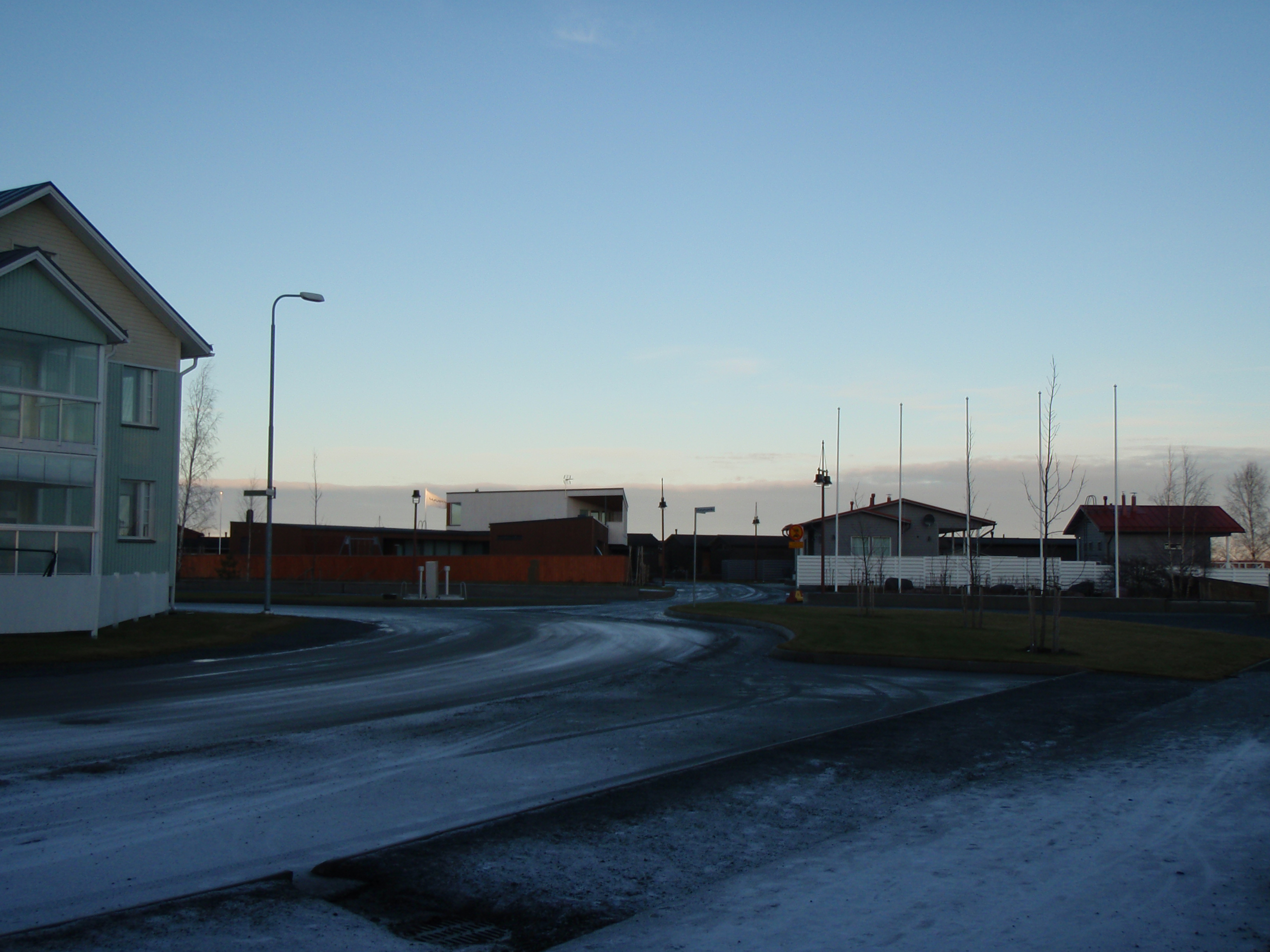 Kuva Reposaaren loma-asuntomessujen alueelta.